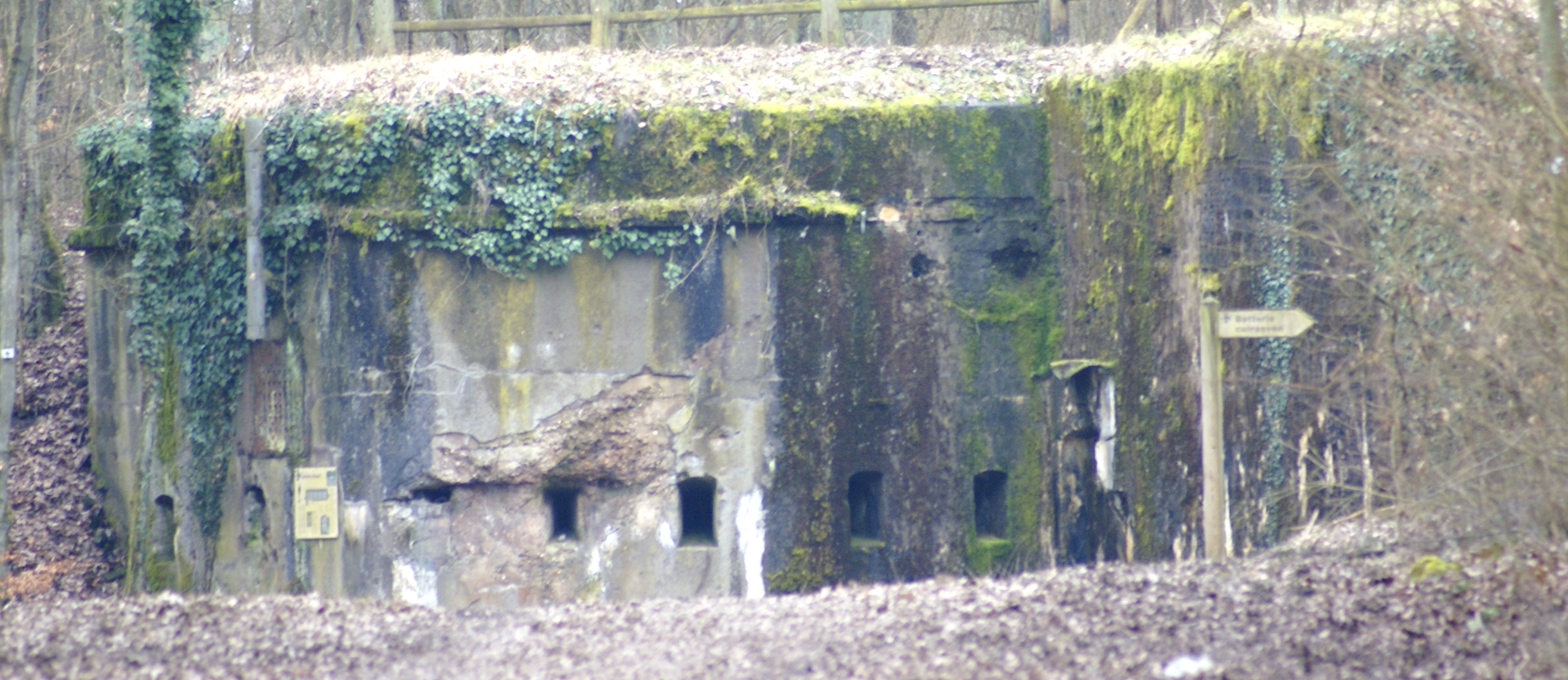 Trace des combats sur la facade du bloc cuirassé du fort d'illange